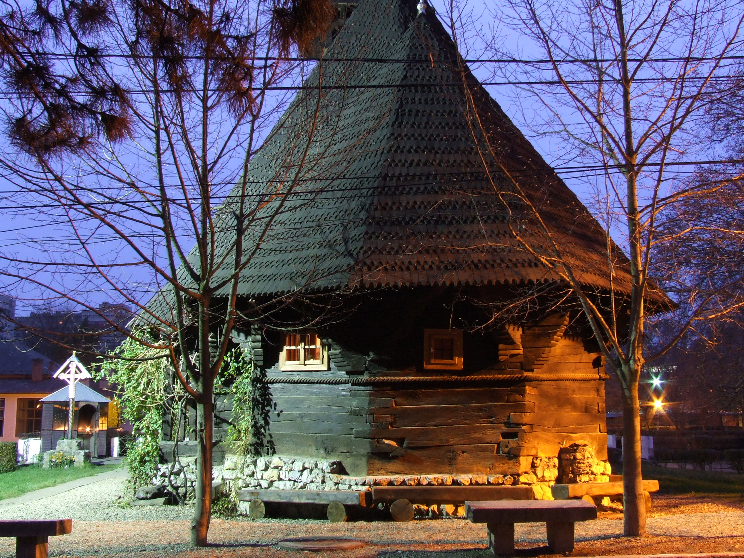 Biserica de lemn din Brusturi, judeţul Bihor.